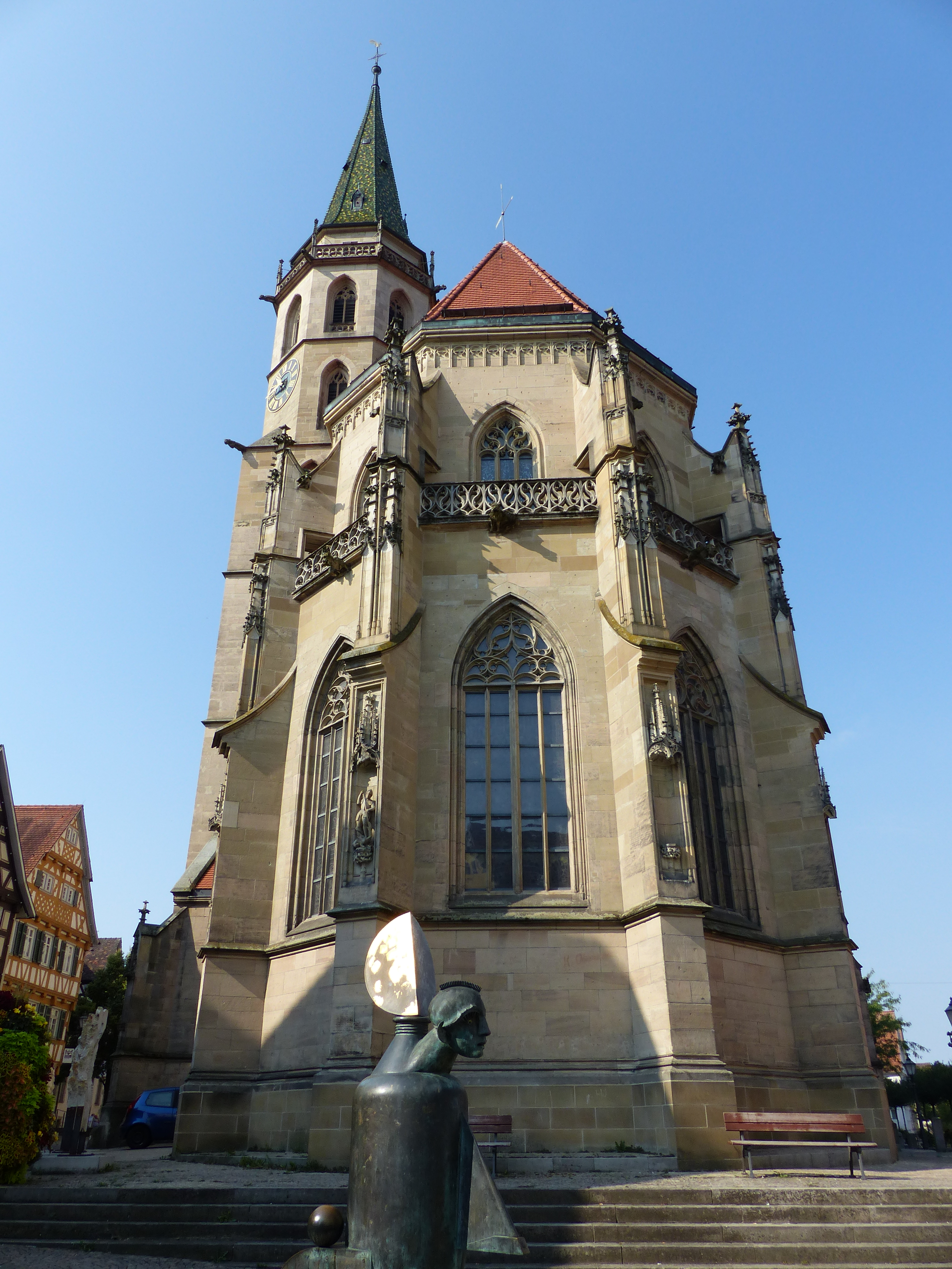 Evangelische Stadtkirche, Schorndorf